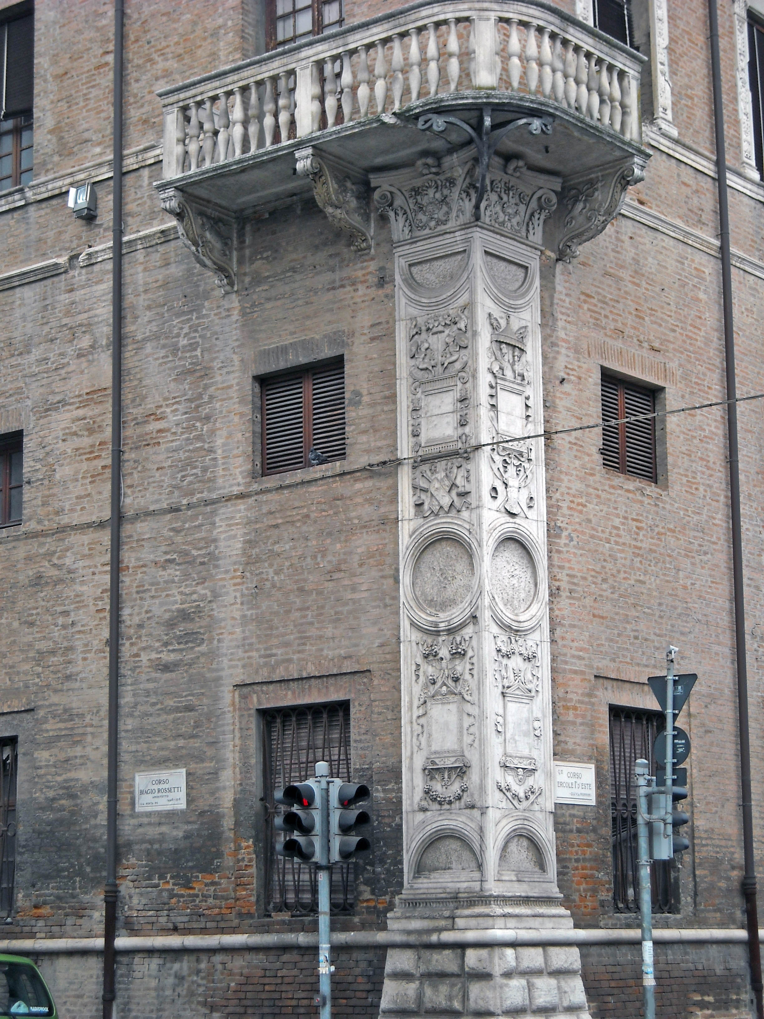 Palazzo Prosperi Sacrati, Ferrara - Italia.